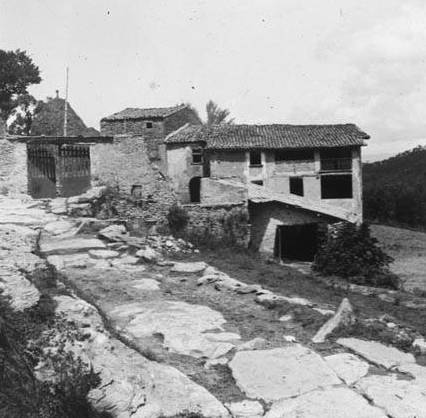 Vista general de la masia de la Riera. Frederic Bordas i Altarriba (ca. 1890)